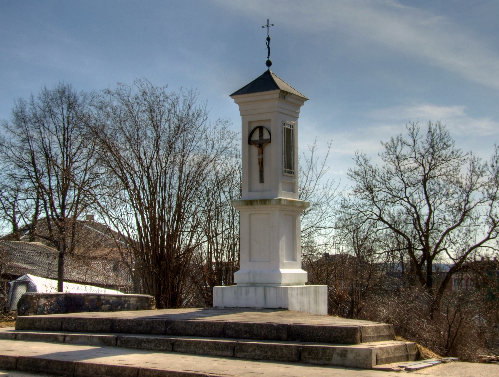 Akmene